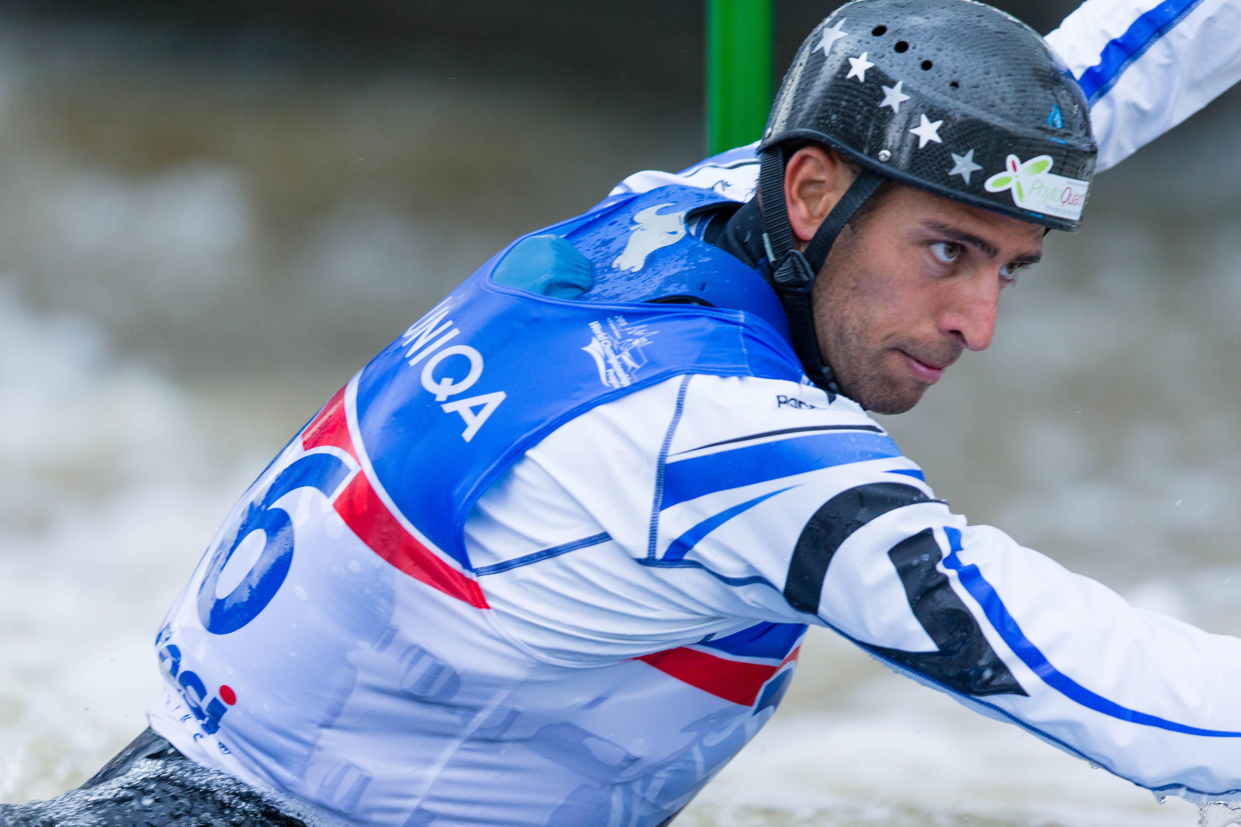 Fabien Lefèvre